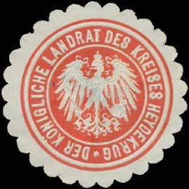 Sealing stamp Title: Der K. Landrat des Kreises Heydekrug Description: rot, weiß, geprägt Place: Heydekrug size: cm